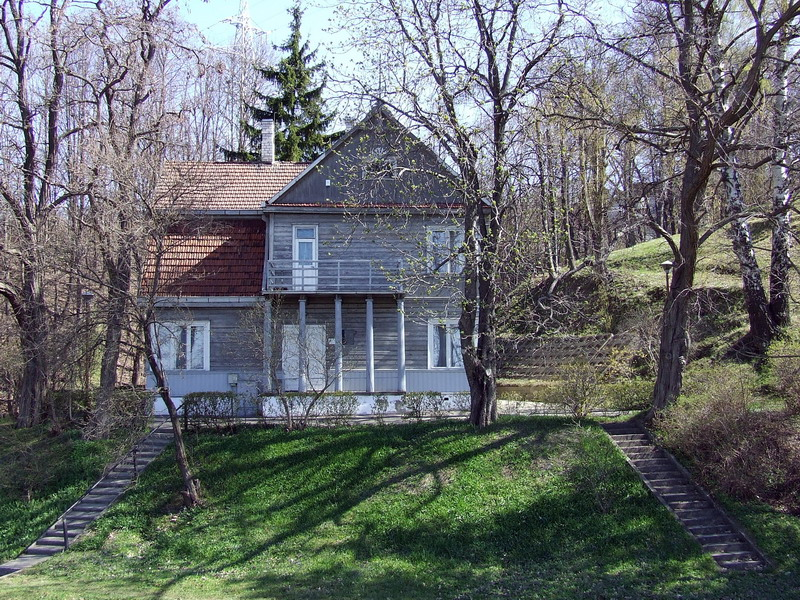 Juozo Gruodžio memorialinis muziejus Kaune.